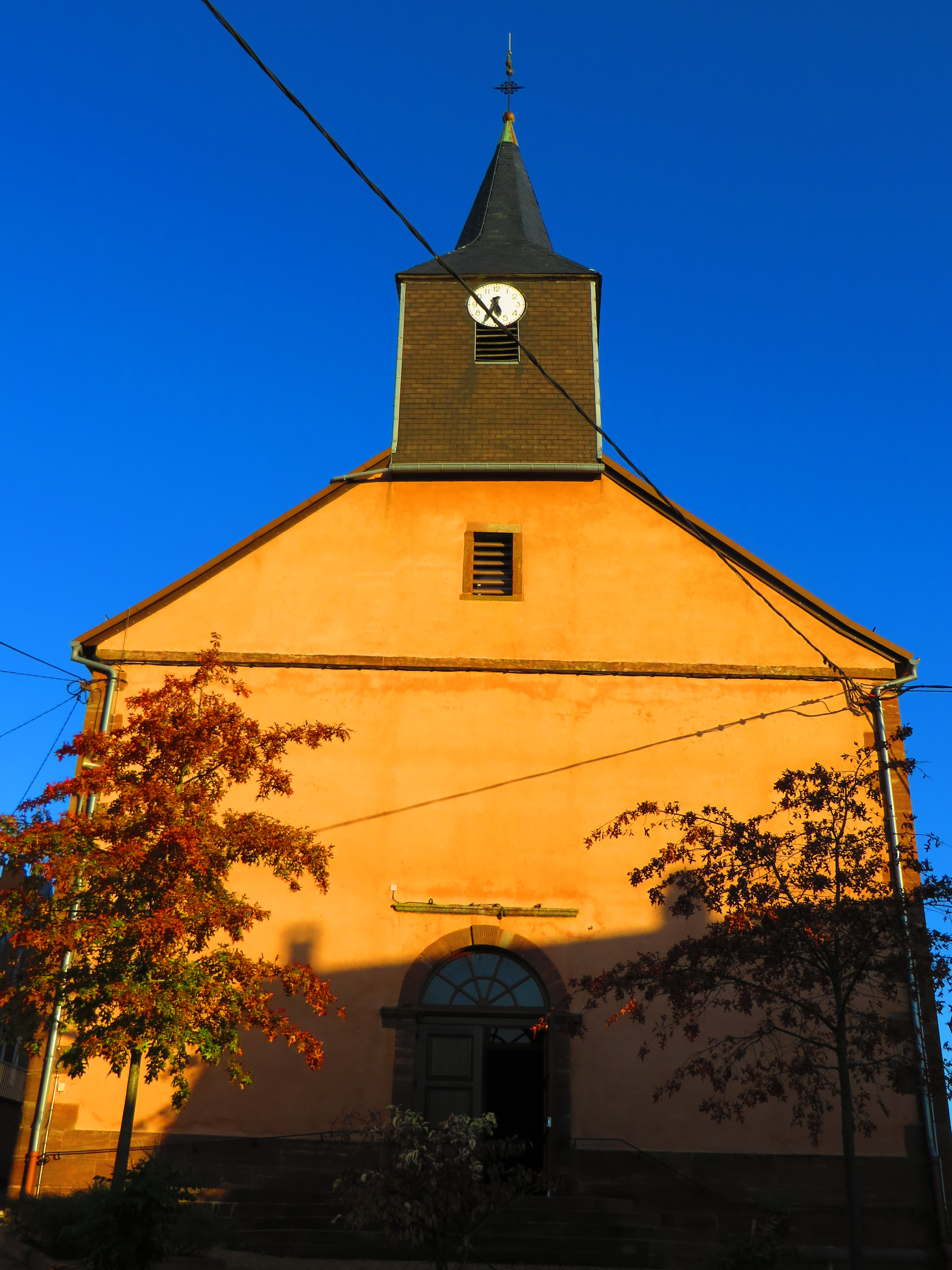 Haselbourg Église Saint-Louis